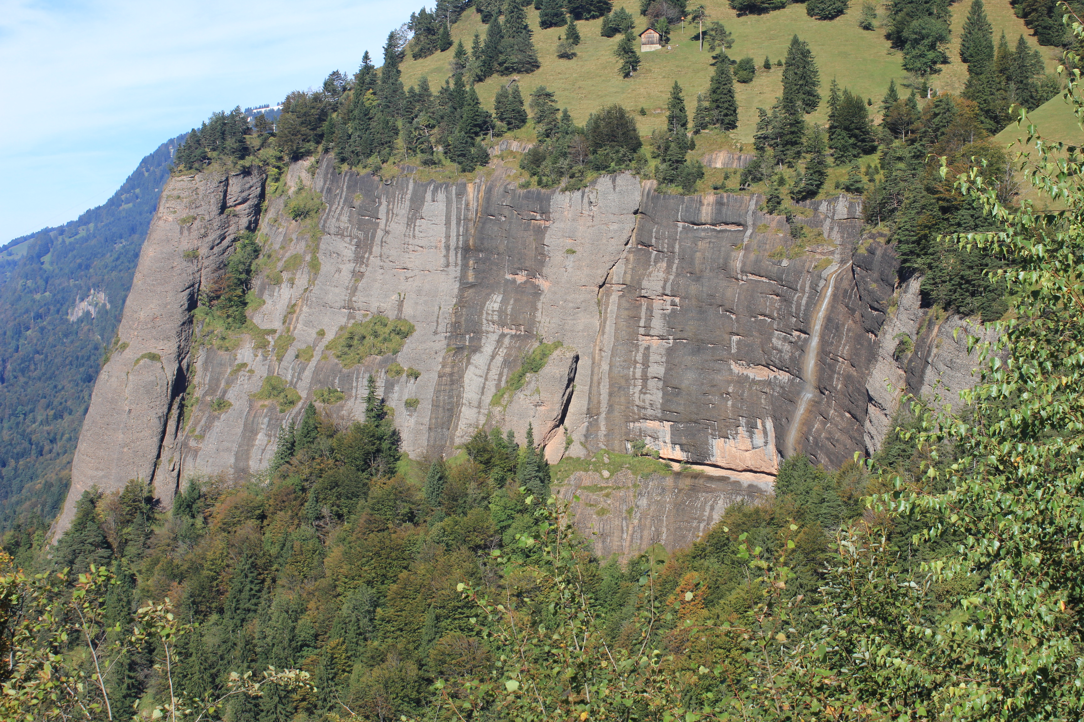 Die Nagelfluhfelswand oberhalb von Vitznau. Die Höhle Steigelfadbalm befindet sich unter dem Wasserfall (links).